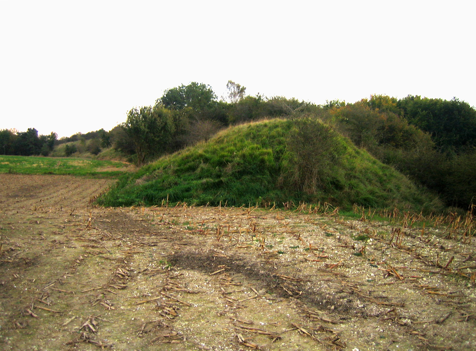 Liercourt (Somme, France) - Talus de l'oppidum (extrémité de la levée de terre). .